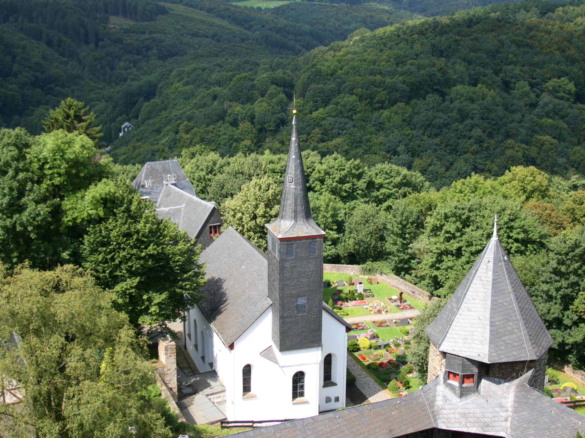 St. Martinus auf Schloss Burg in Solingen-Burg